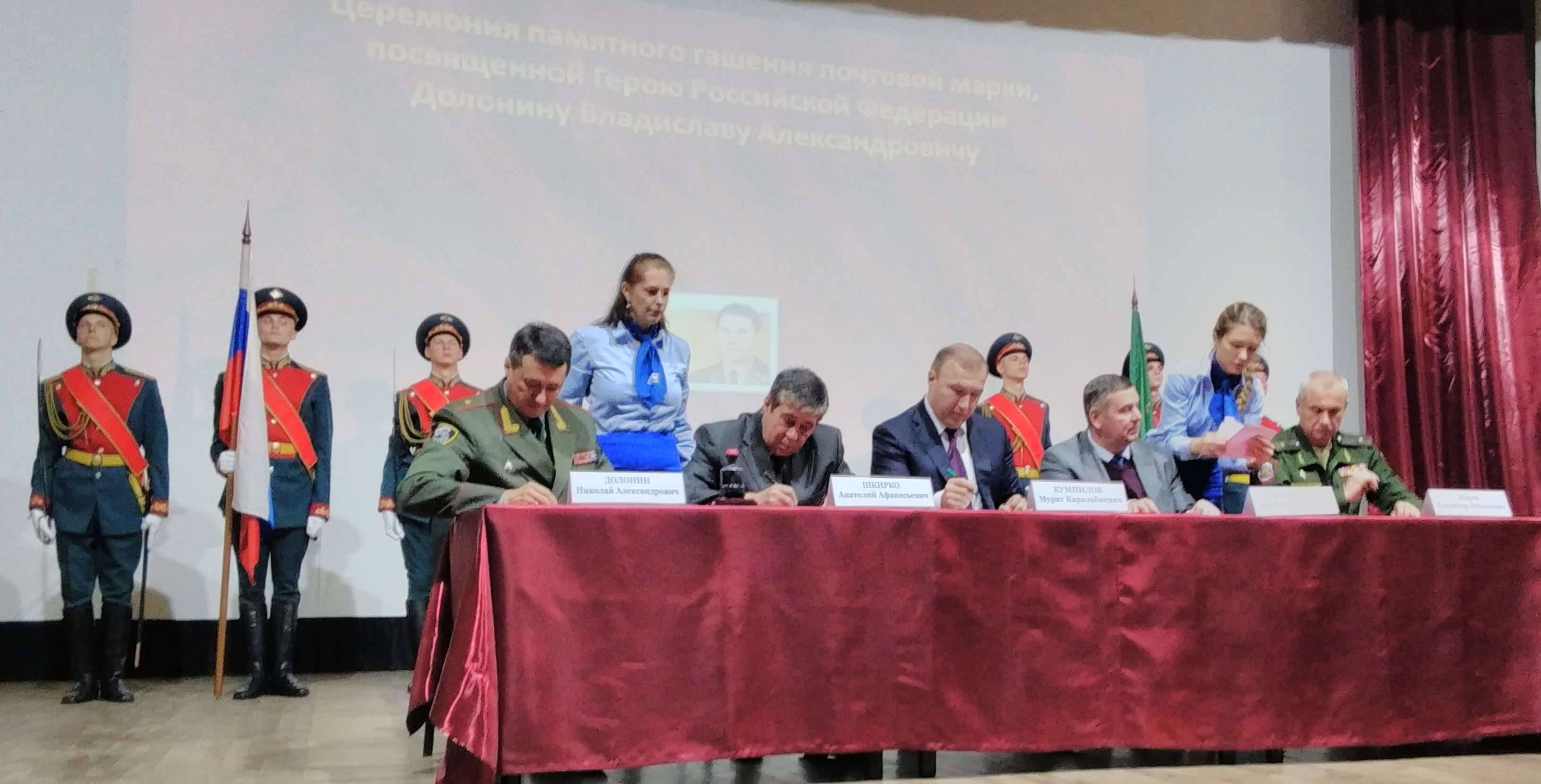 Гашение почтовой марки Герой России Долонин В.А. Майкоп 5.10.2017.